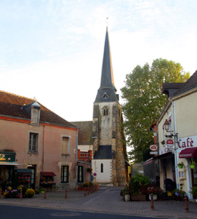 Église et place du village de Châtres-sur-Cher .